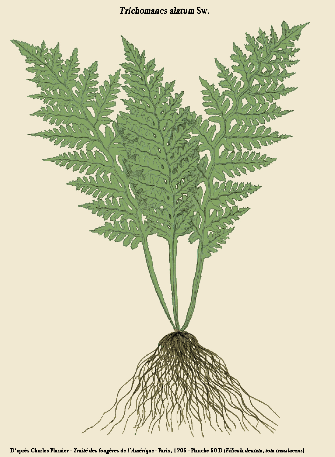 Trichomanes alatum Sw. - D'après Charles Plumier - Traité des fougères de l'Amérique - Paris, 1705 - Planche 50 D (Filicula dentata, tota translucens), reprise par D. Prévôt